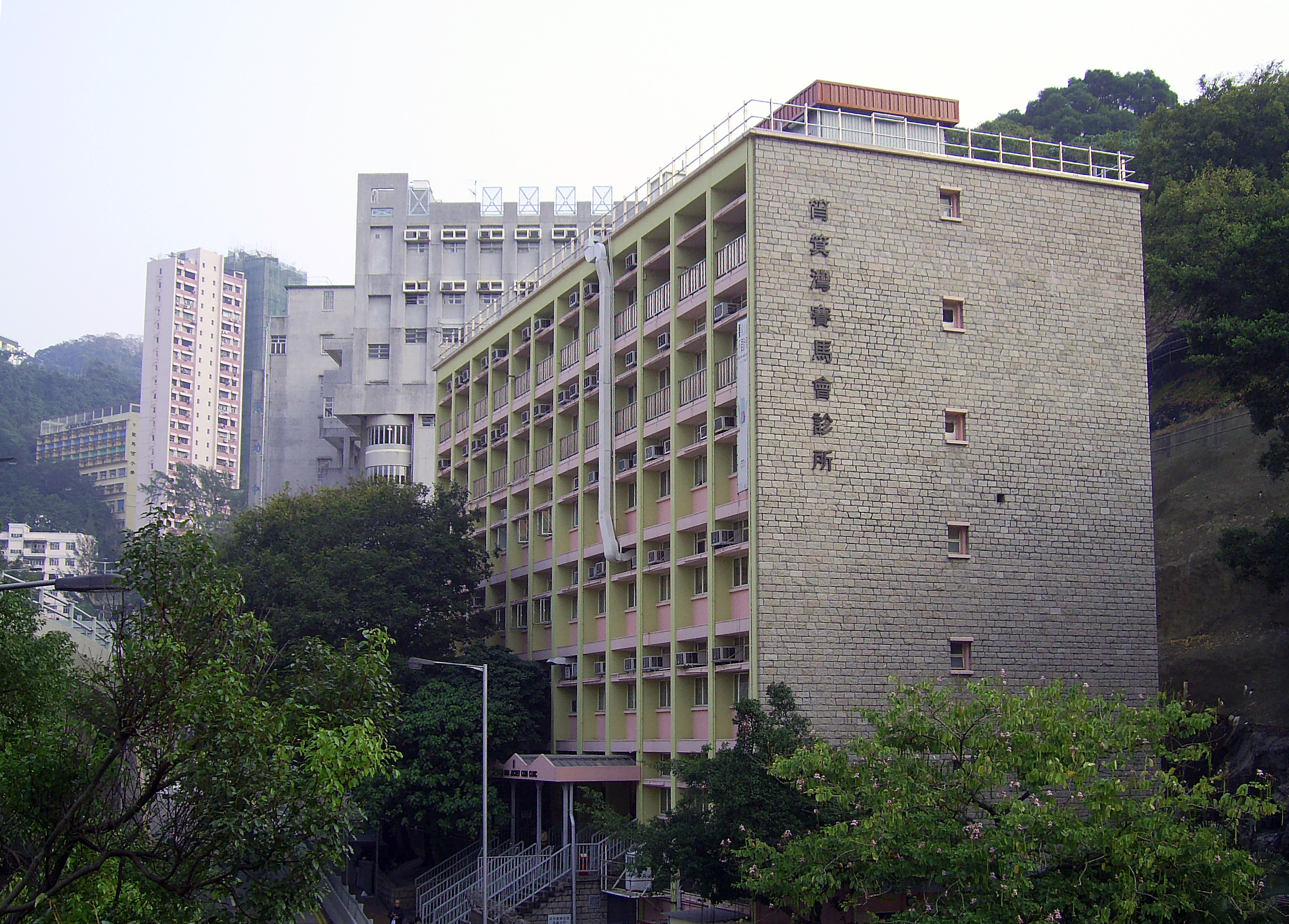 中文（香港）: 筲箕灣賽馬會診所